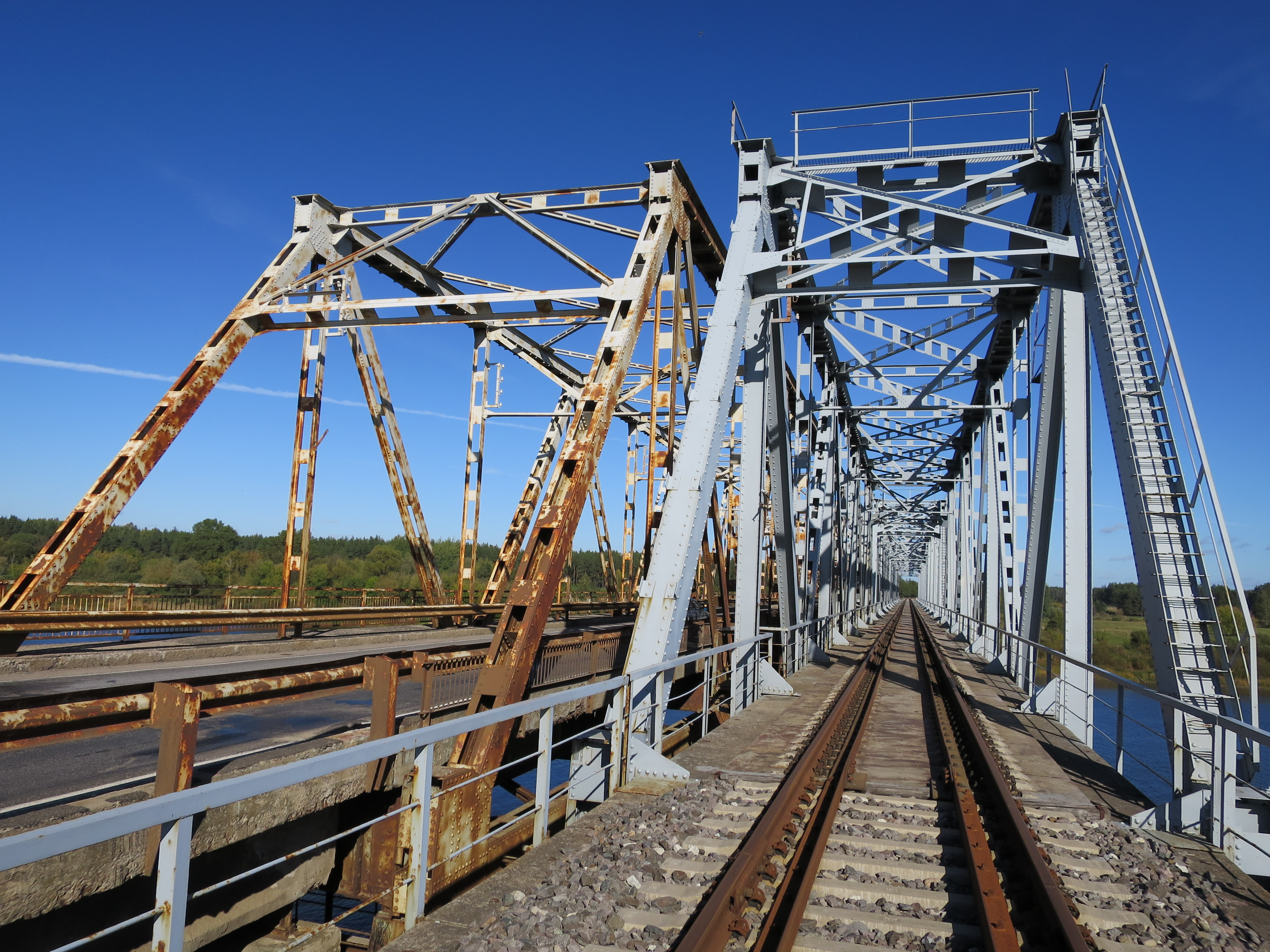 Sventes tilts